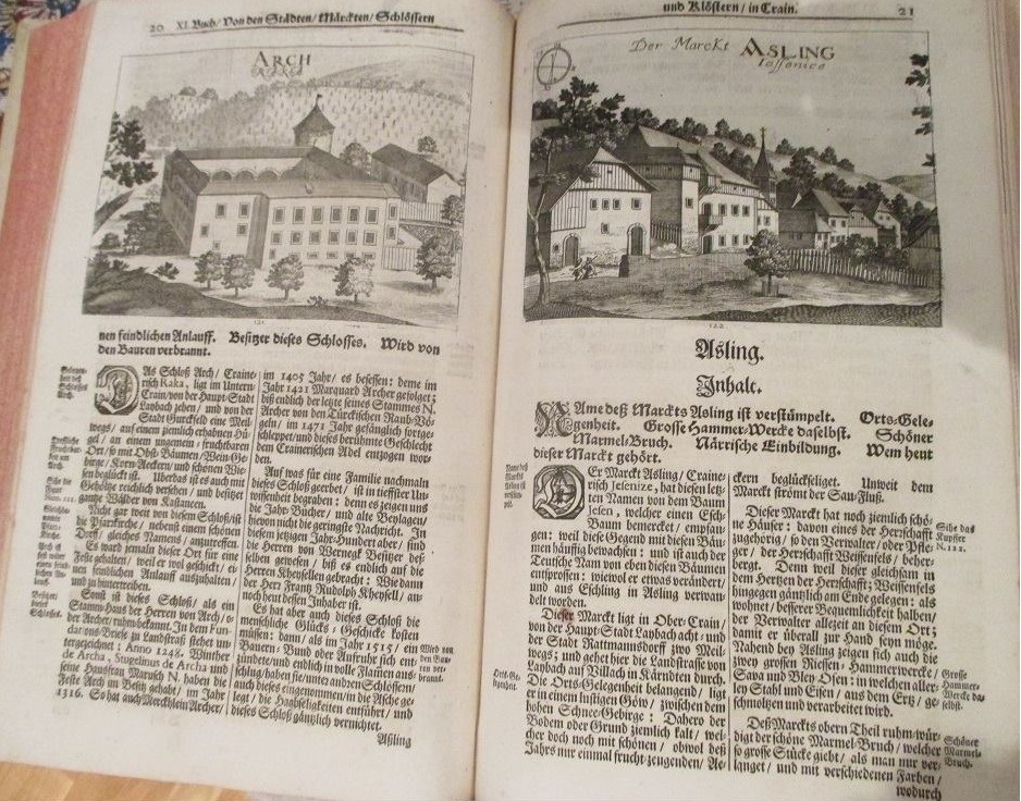 valvazor